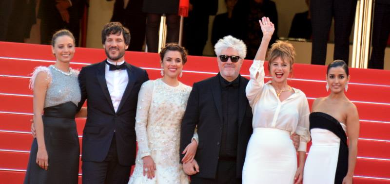 Présentation du film "Julieta" au festival de Cannes. De gauche à droite : Michelle Jenner, Daniel Grao, Adriana Ugarte, Pedro Almodóvar, Emma Suárez, Inma Cuesta.